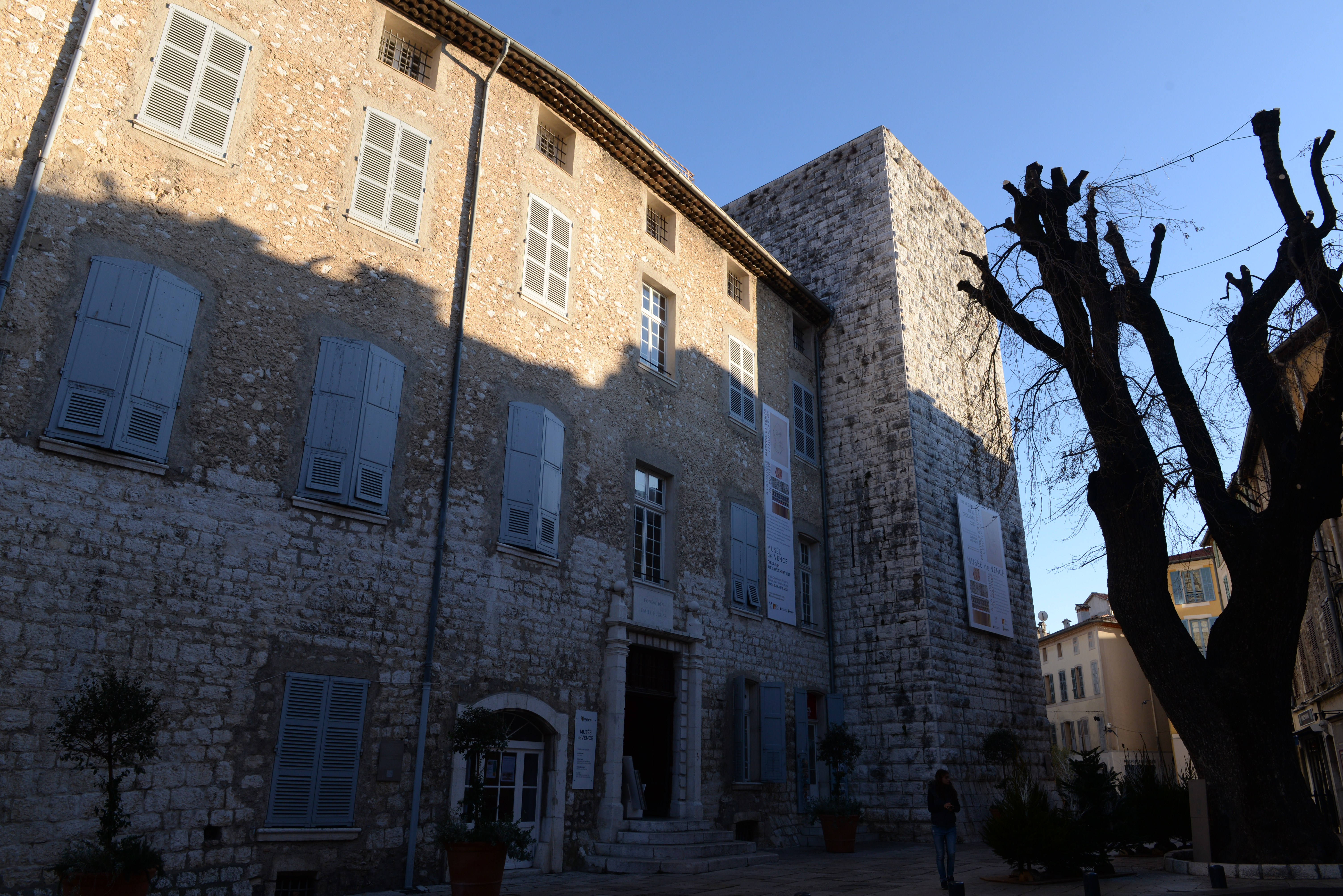 Remparts de Vence (Alpes-Maritimes) - La Tour